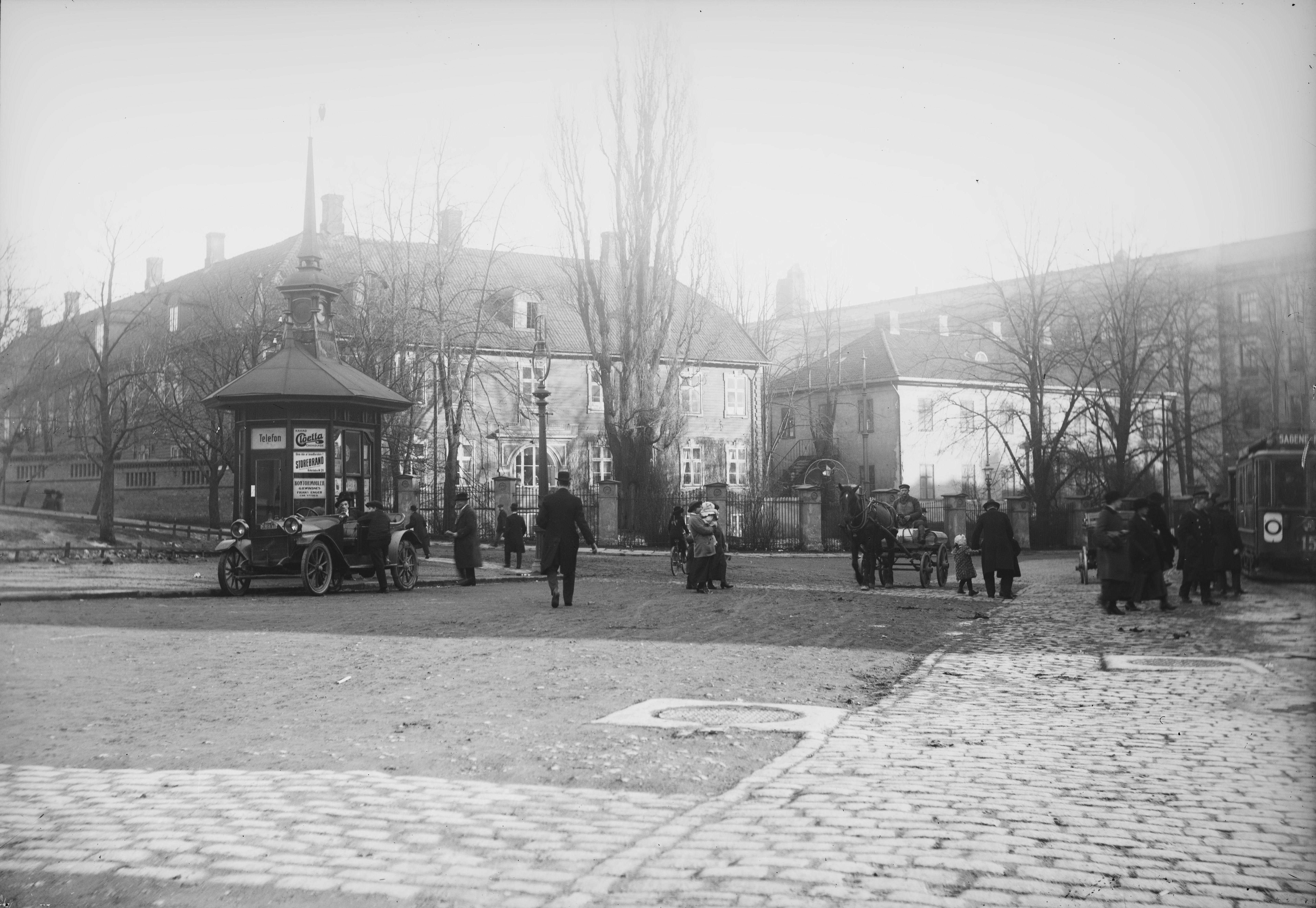 Bildet er hentet fra Nasjonalbibliotekets bildesamling. Anmerkninger til bildet var: Påskrift arkivark: Den gamle fødselsstiftelsen 1916 Arkivnummer: 189 Oslo, Oslo